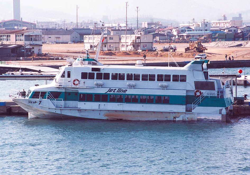 関西汽船 ジェット7 ボーイング929 高松港